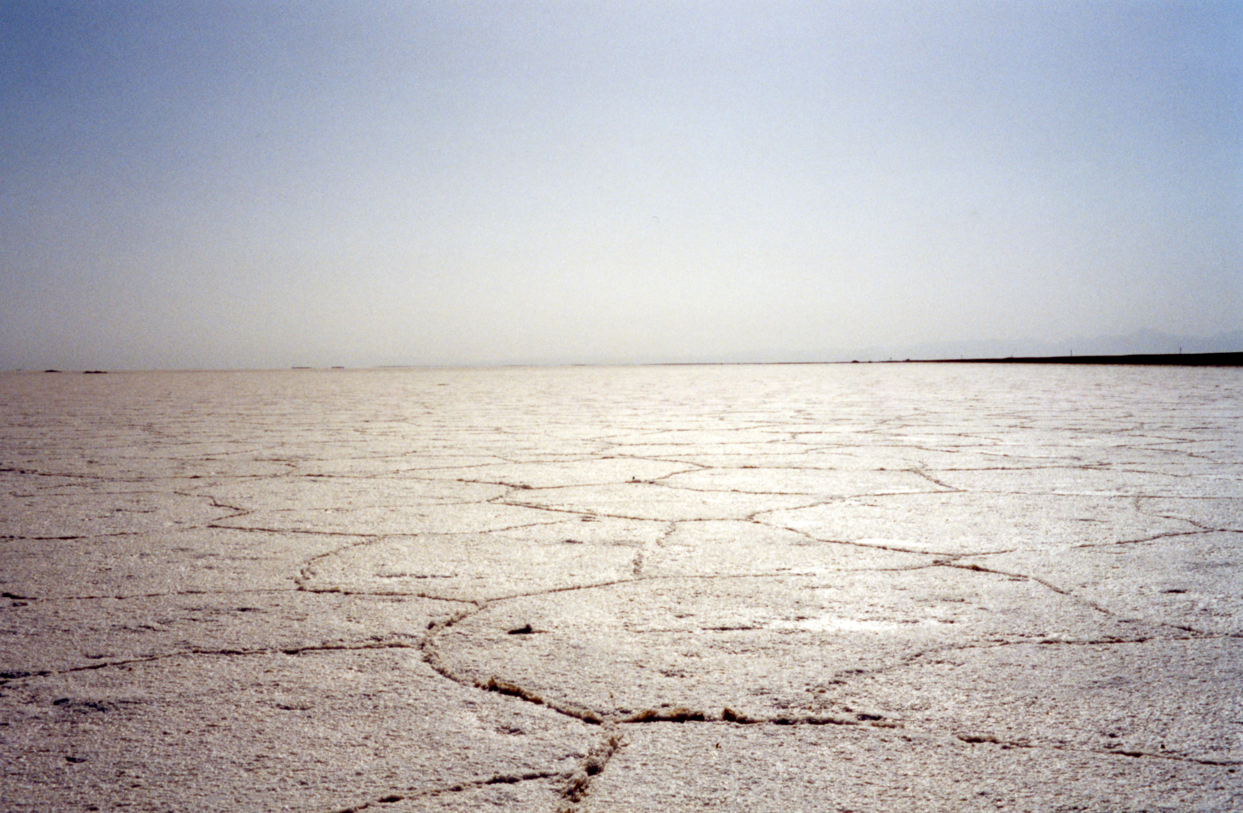 Iran - Désert de sel - Salt desert Le désert Iranian comprend deux zones distinctes, le Dasht-e-Kavir, ou désert de Kavir, et le Dasht-e-Lut, ou désert de Lut. Le mot perse "dash" signifie “desert”. En gros, sur le trajet qui va de Machad à Ispahan, le Dasht-e-Kavir est côté nord, et le Dasht-e-lut est côté sud. Le Dasht-e-Lut comprend de riches réserves de pétrole.